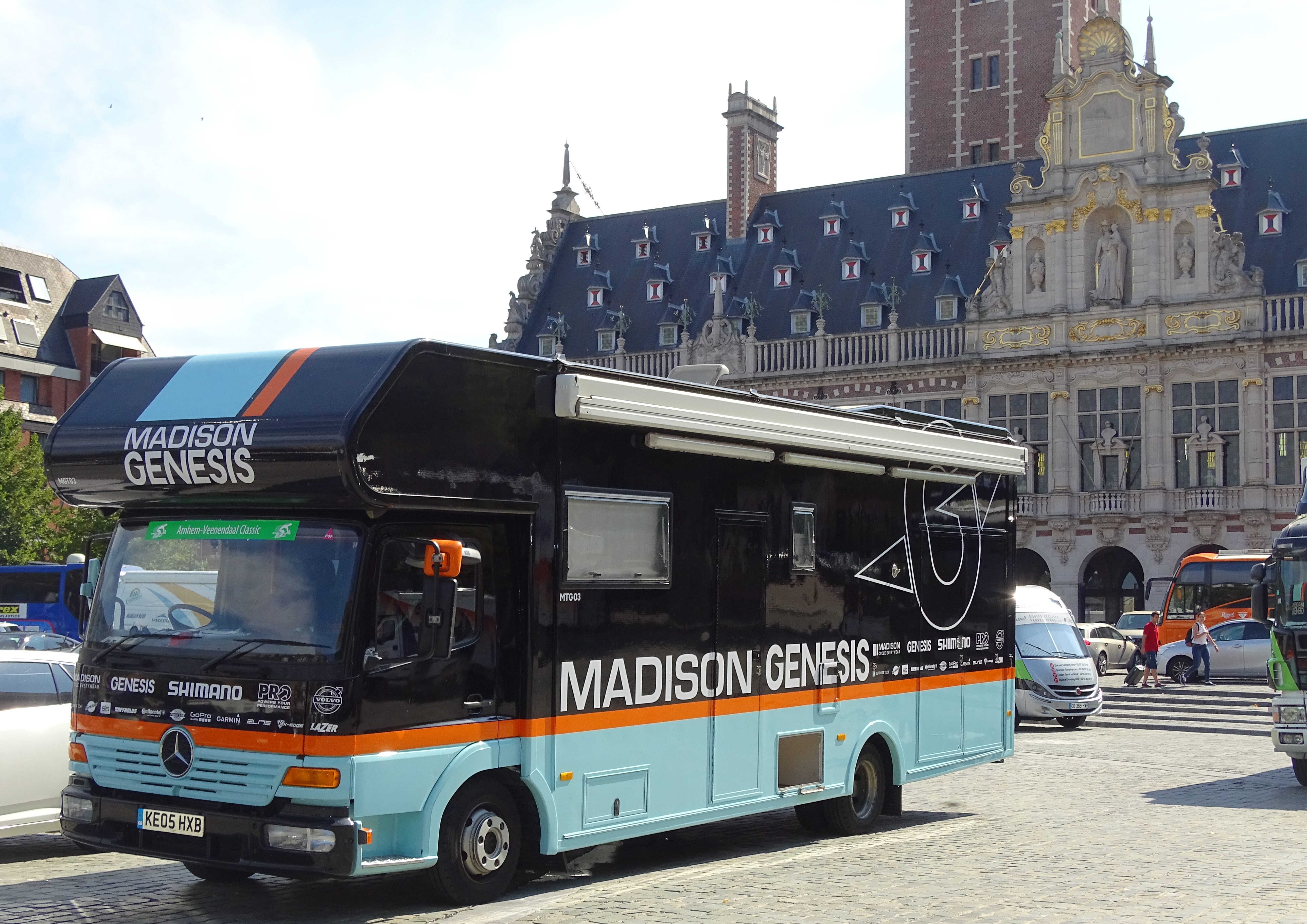 Reportage réalisé le dimanche 23 août à l'occasion du départ et de l'arrivée du Grand Prix Jef Scherens 2015 à Louvain, Belgique.